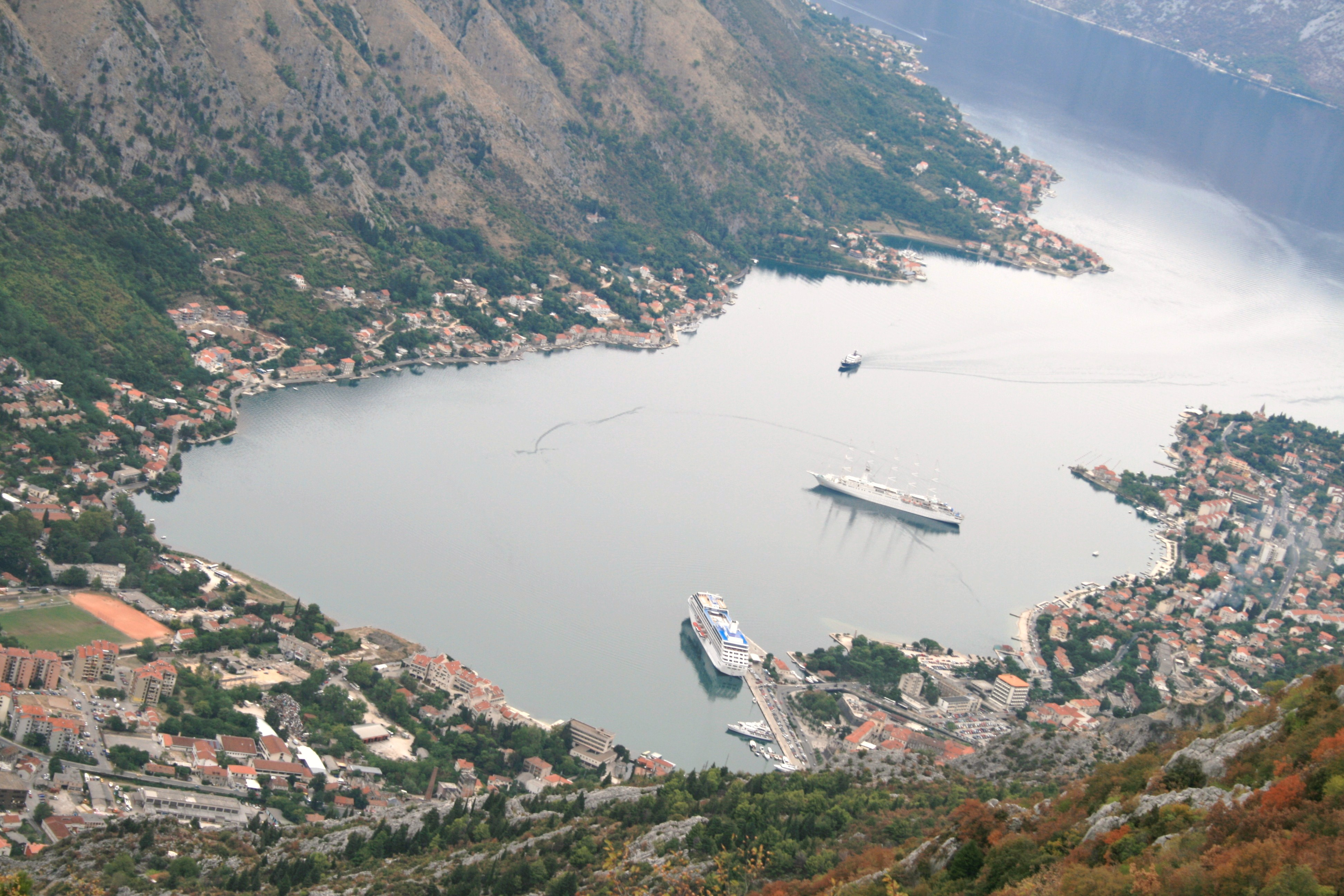 Вид с высоты на Которский залив и корабли в порту Котора, Черногория